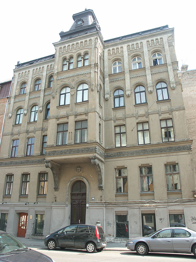 Латвия (Latvija): Рига (Rīga): ул.Тербатас (Tērbatas iela),86; 14:31 10.07.2006